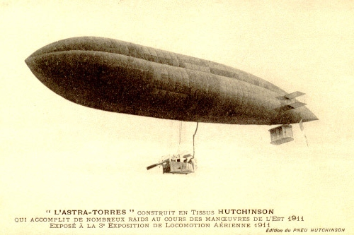 "L'Astra-Torres" construit en Tissus HUTCHINSON / qui accomplit de nombreux raids au cours des manoeuvres de l'Est 1911 / Espose a la 3e Exposition de Locomotion Aerienne 1911 / Edition du PNEU HUTCHINSON